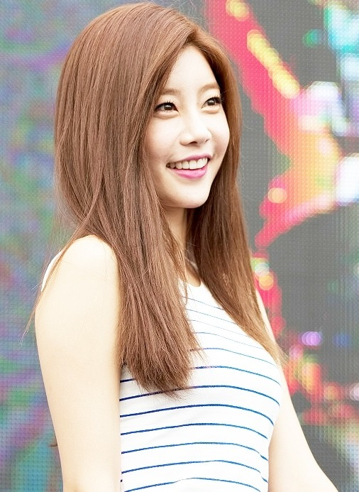 김해 워터파크에서 소진